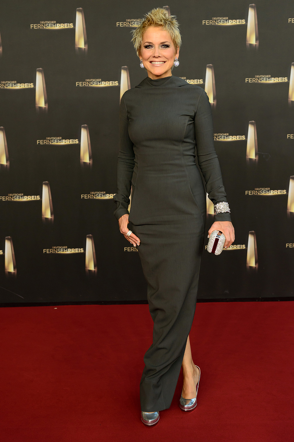 Ankunft von Inka Bause auf dem 16. Deutschen Fernsehpreis am 2. Oktober 2014 in Köln.